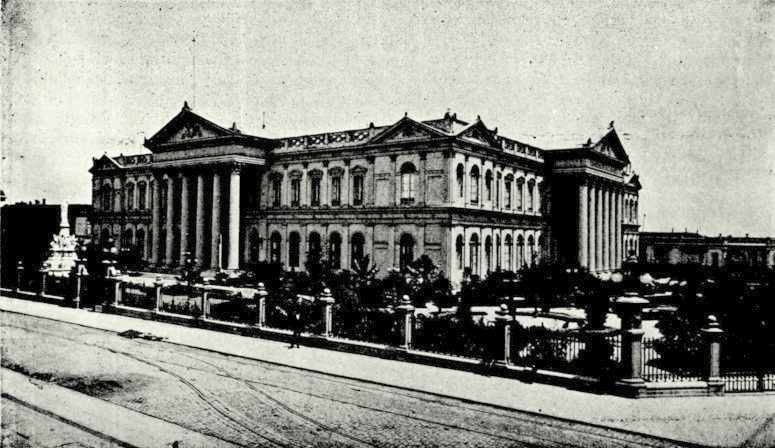 Imagen en Chile descripción física, política, social industrial y comercial de la República de Chile, por Carlos Tornero.1903